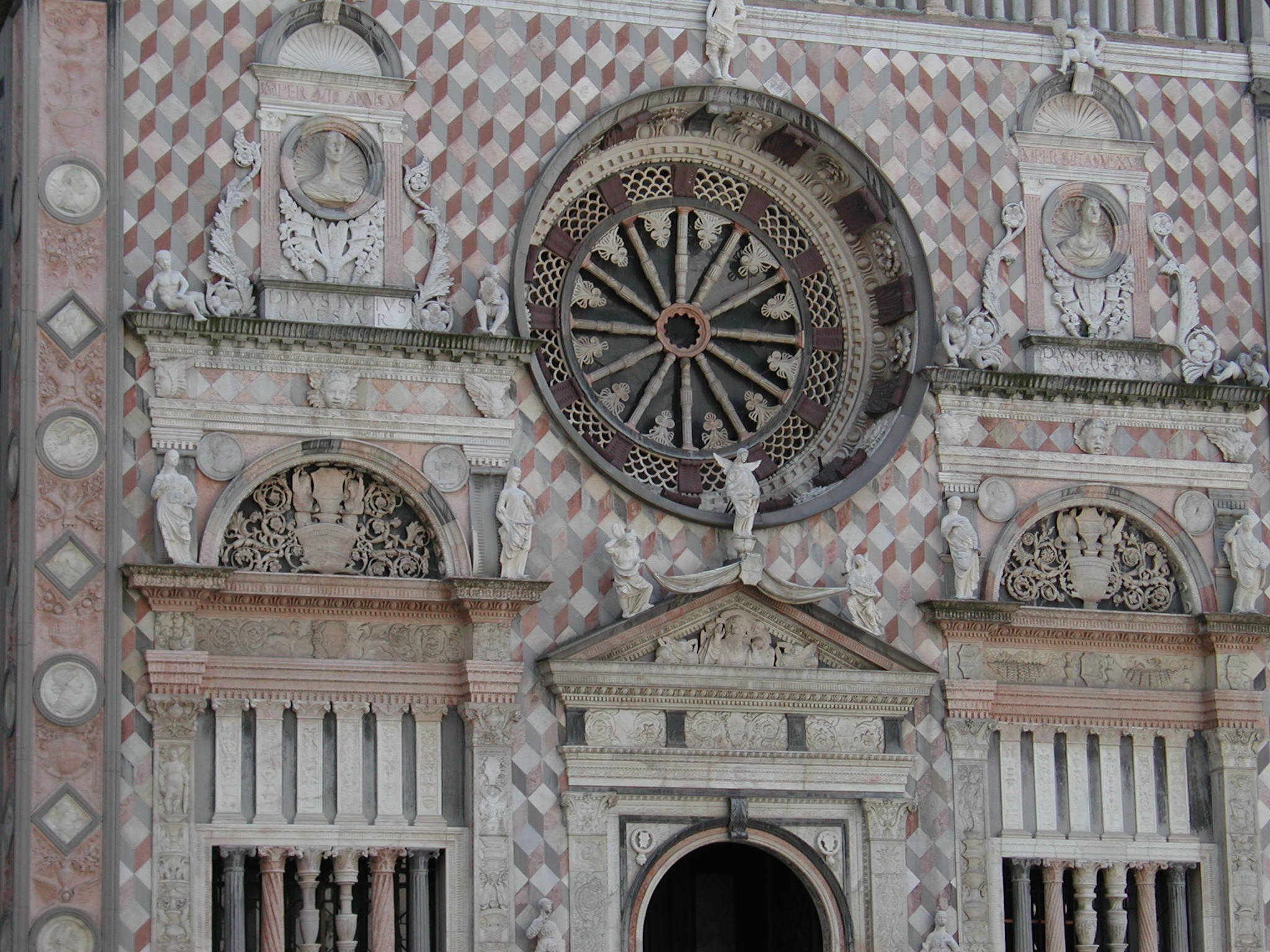 Cappella Colleoni, Bergamo, Italy